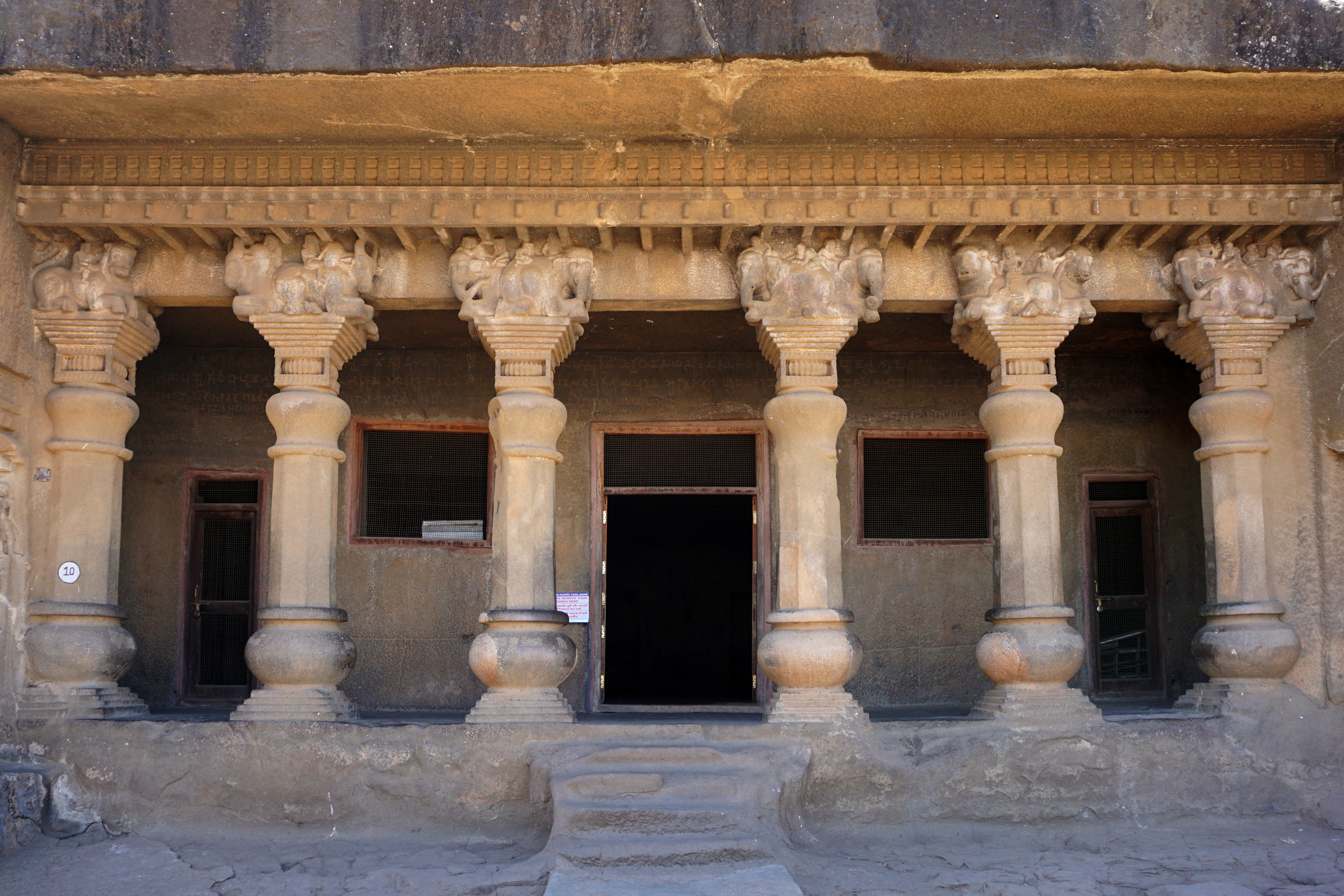 Trirasmi Caves, Nashik, India Pandavlena, Nashik, India